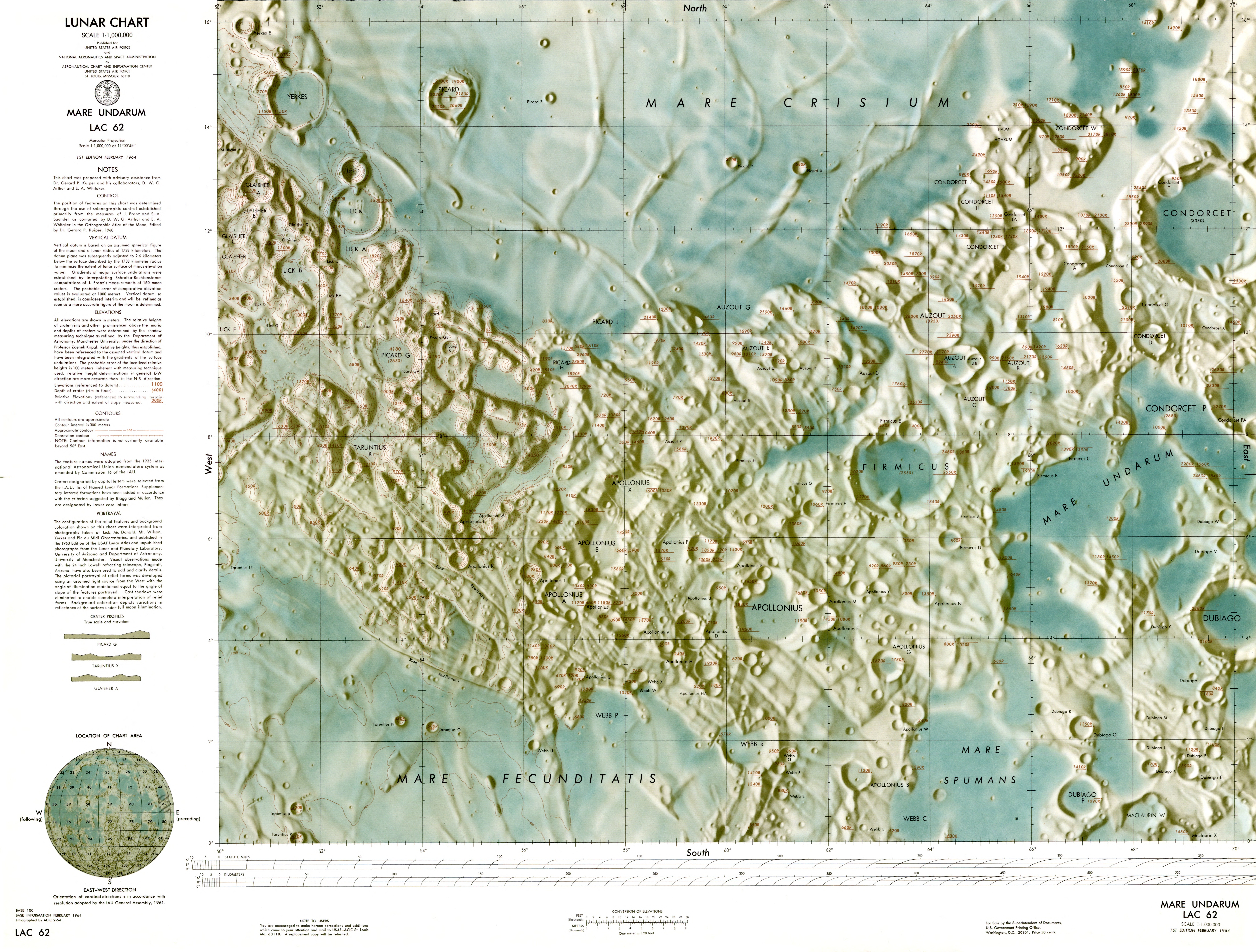 1:000 000 scale lunar chart - Mare Undarum (LAC 62)